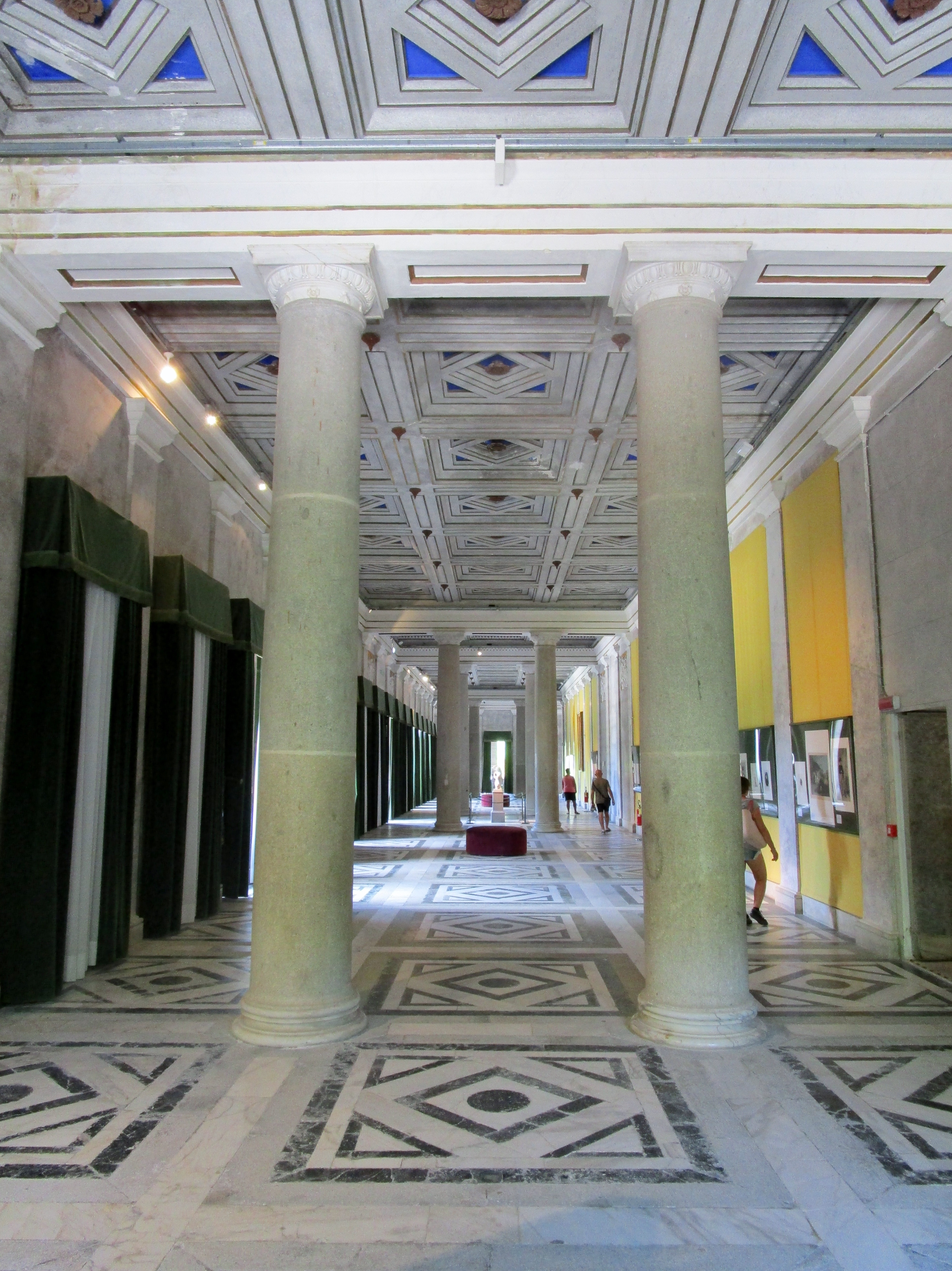 Portoferraio, interno della galleria Demidoff presso villa San Martino.